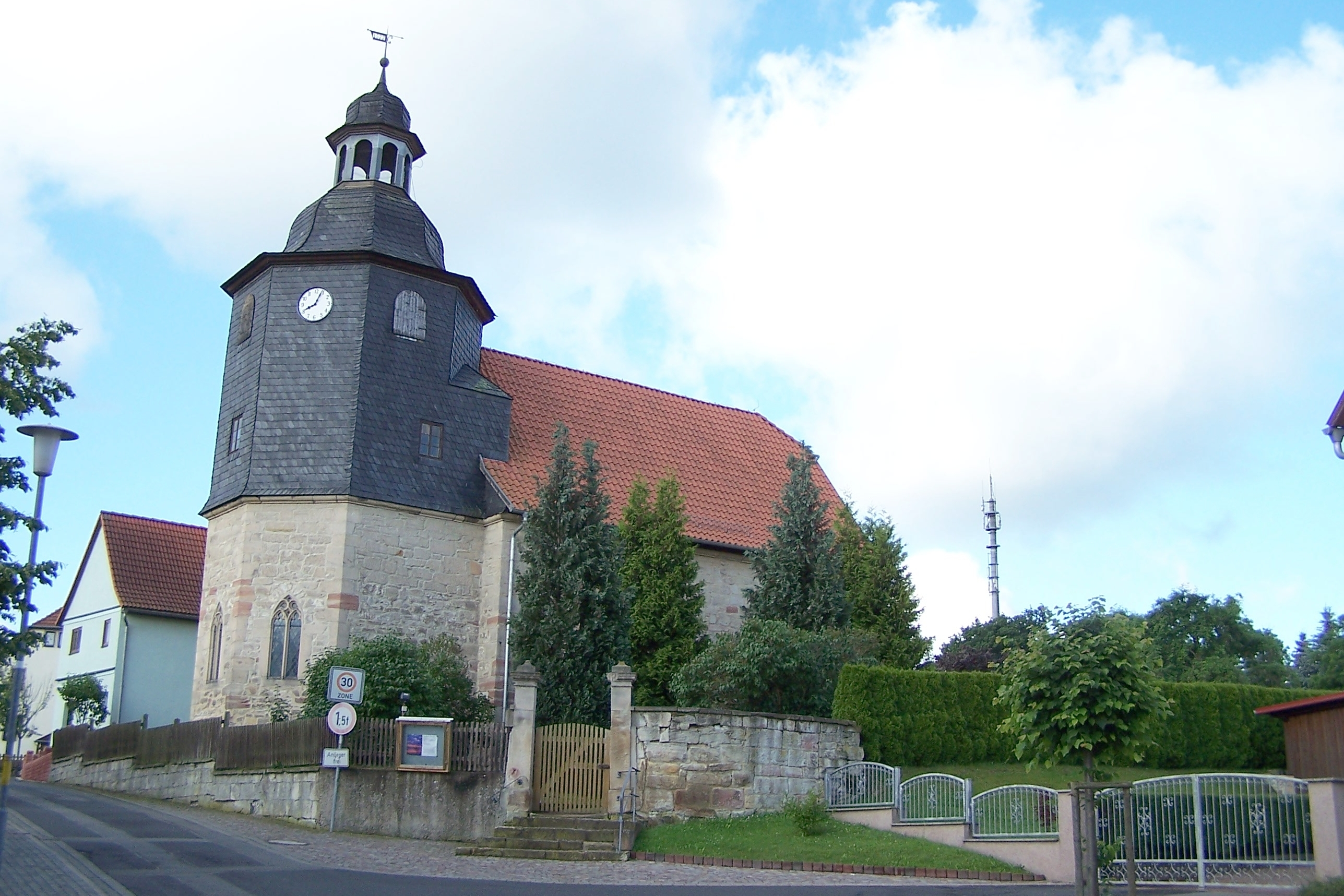 Ansichten und Details der Kirche